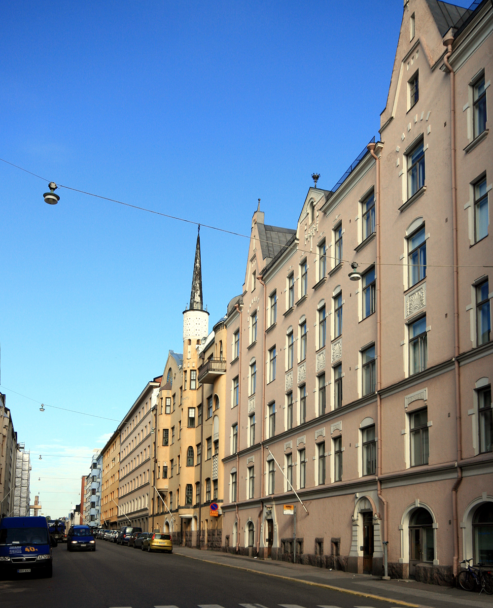 Pietarinkatu, Ullanlinna, Helsinki.